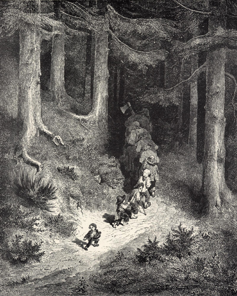 Illustration for Charles Perrault's Le Petit Poucet from Histoires ou Contes du Temps passé: Les Contes de ma Mère l'Oye (1697). Gustave Doré's illustrations appear in an 1867 edition entitled Les Contes de Perrault. Fifth of eleven engravings